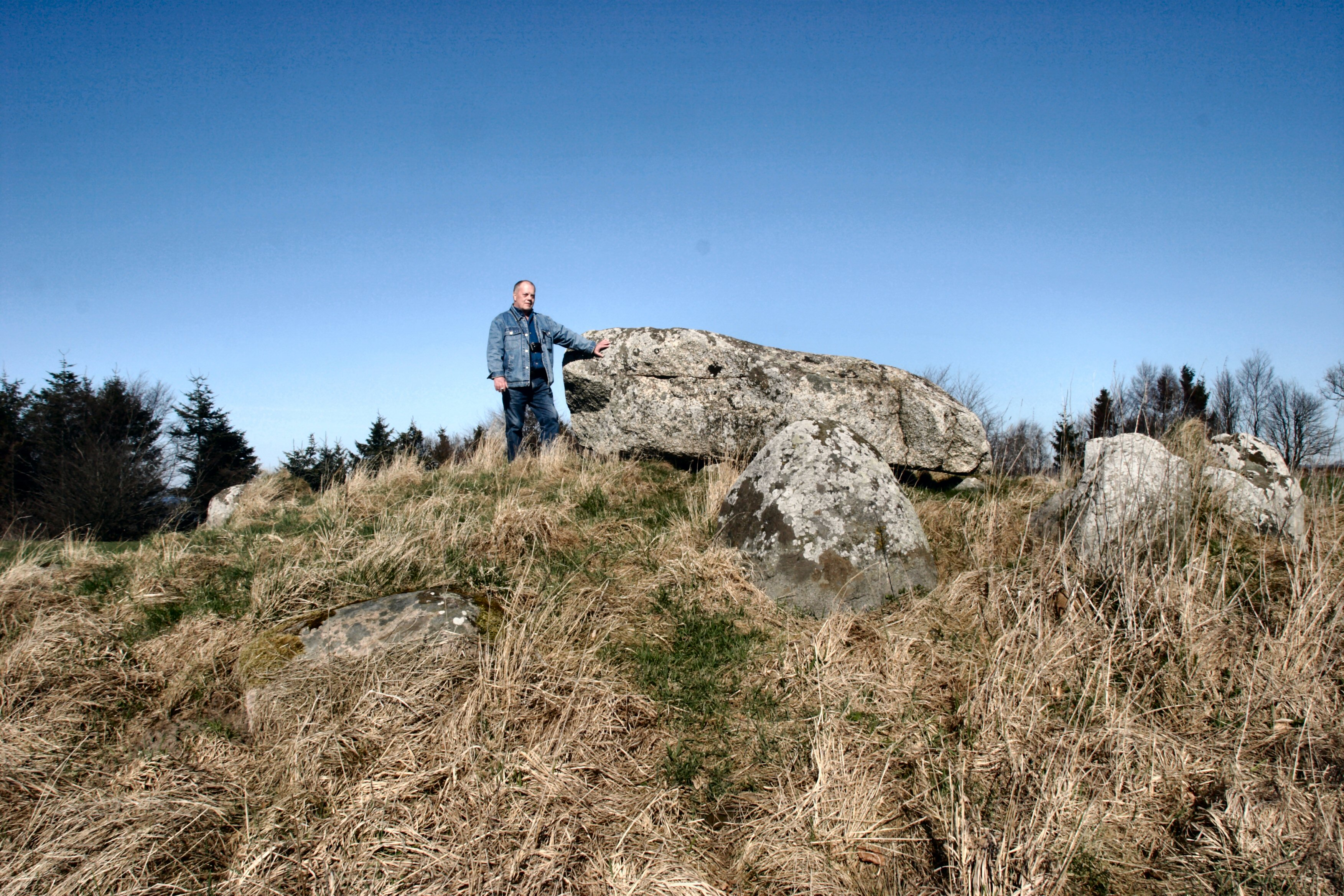 Agri Dyssen